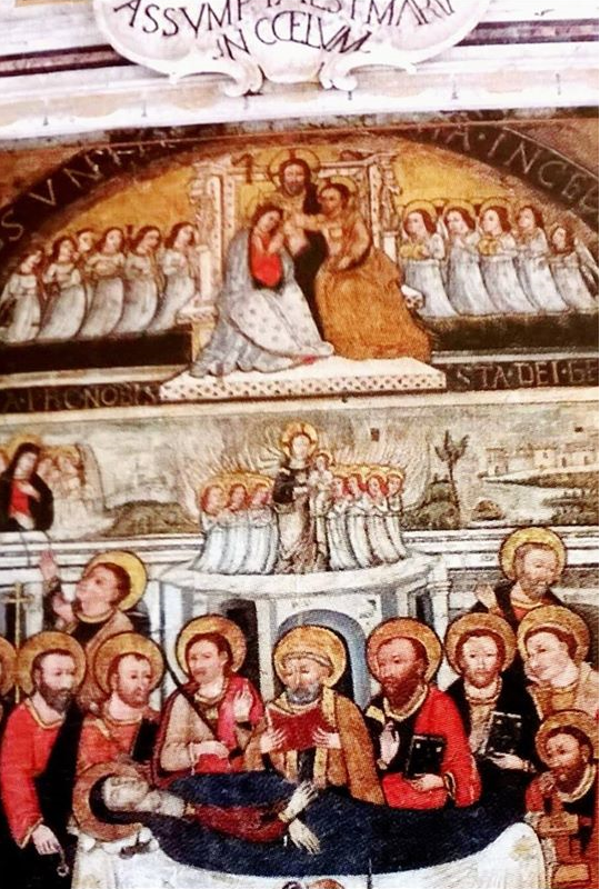 Dormitio Virginis